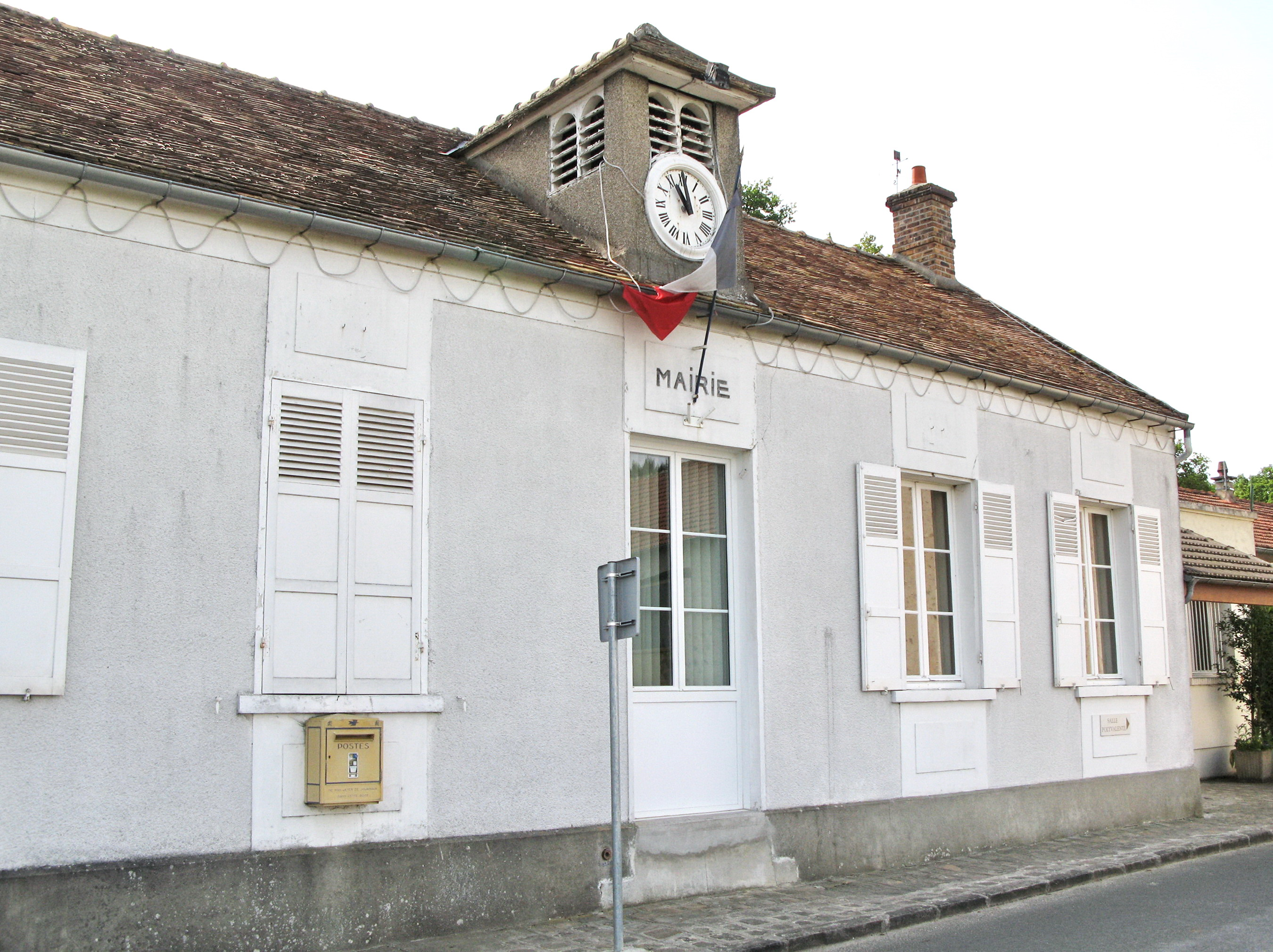 Mairie de Saint-Yon (Essonne)